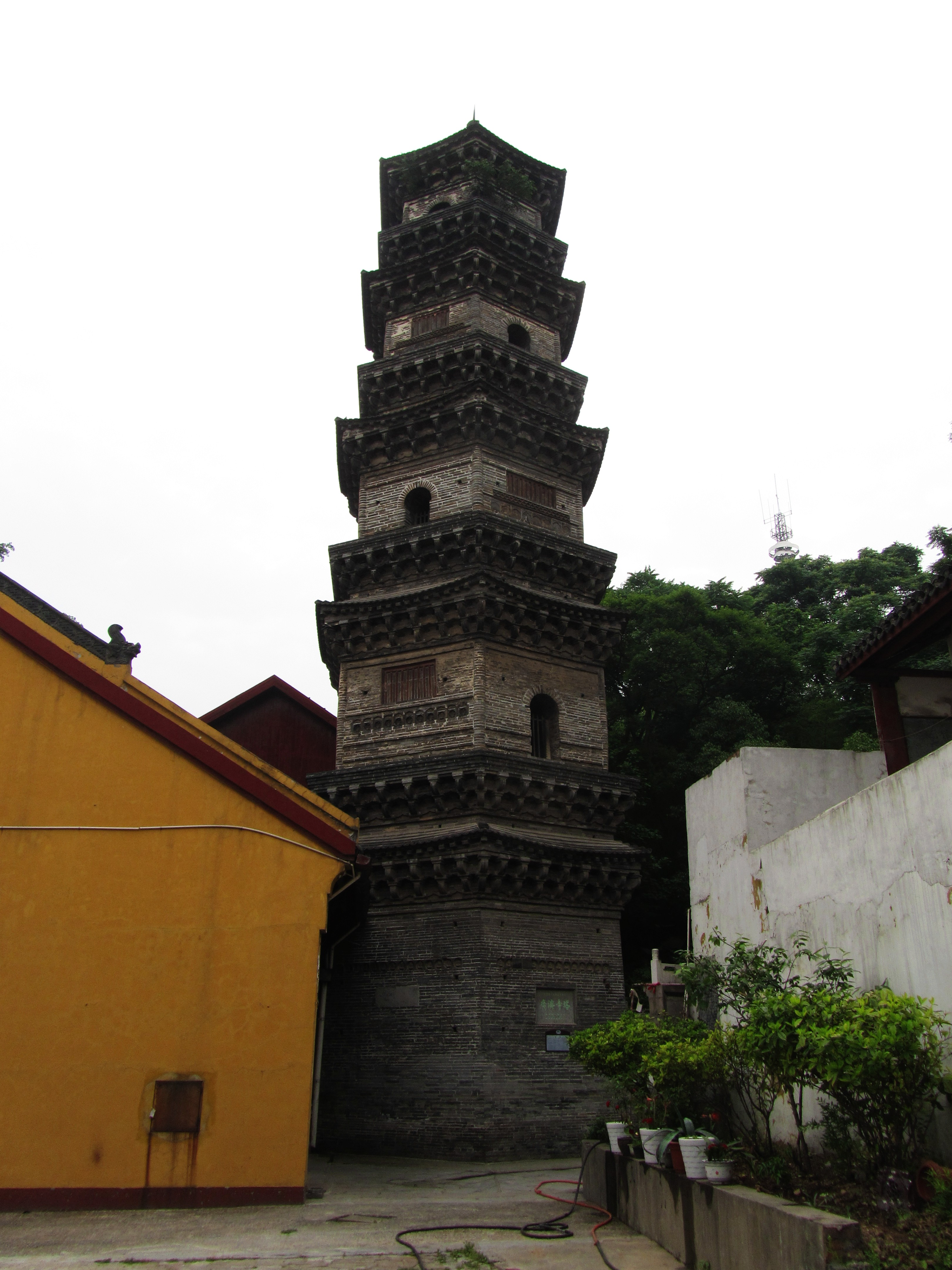 芜湖广济寺，地藏殿和赭塔东面。